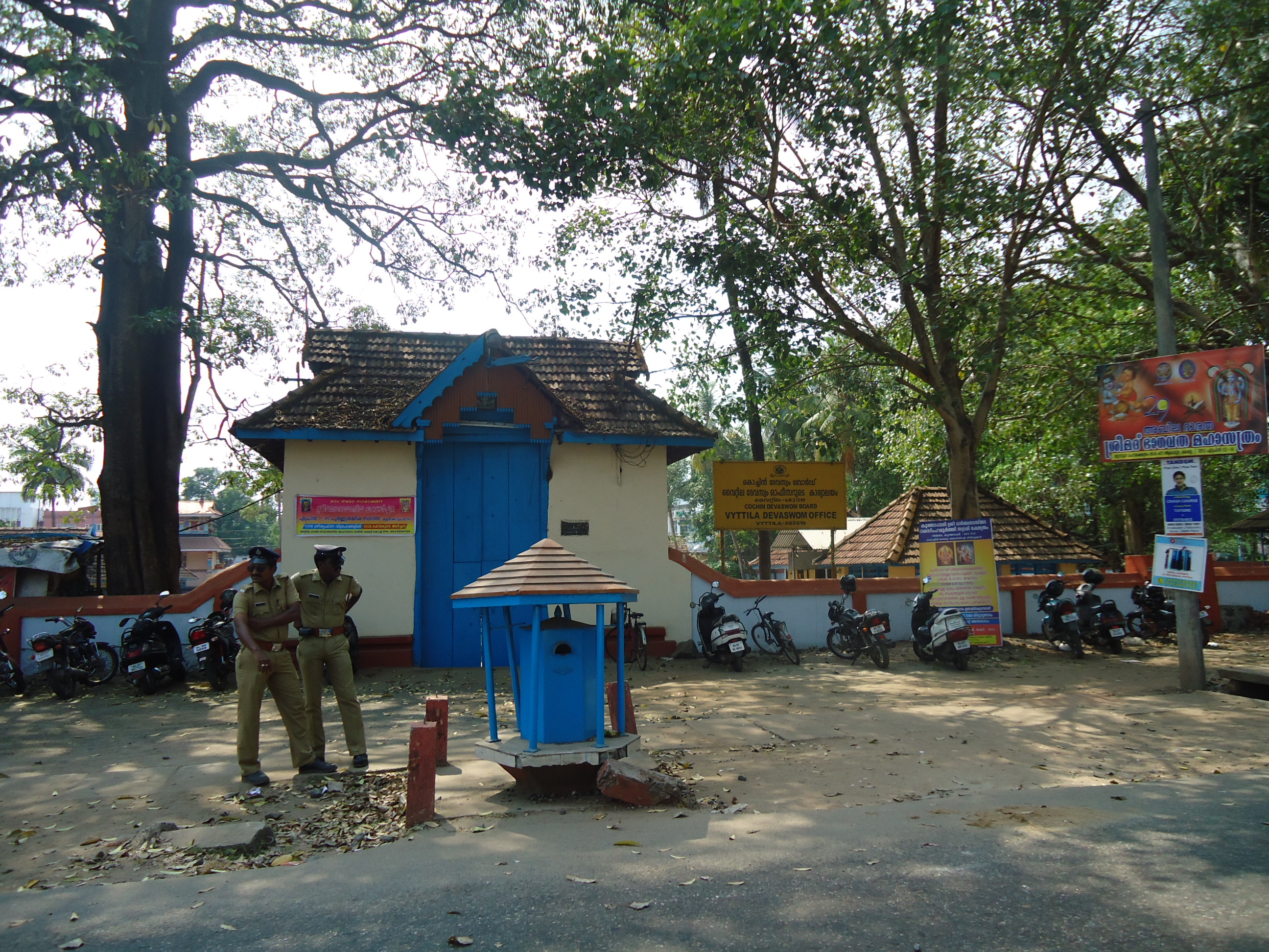 Kochin Devaswam Board Vyttila Devaswam Office